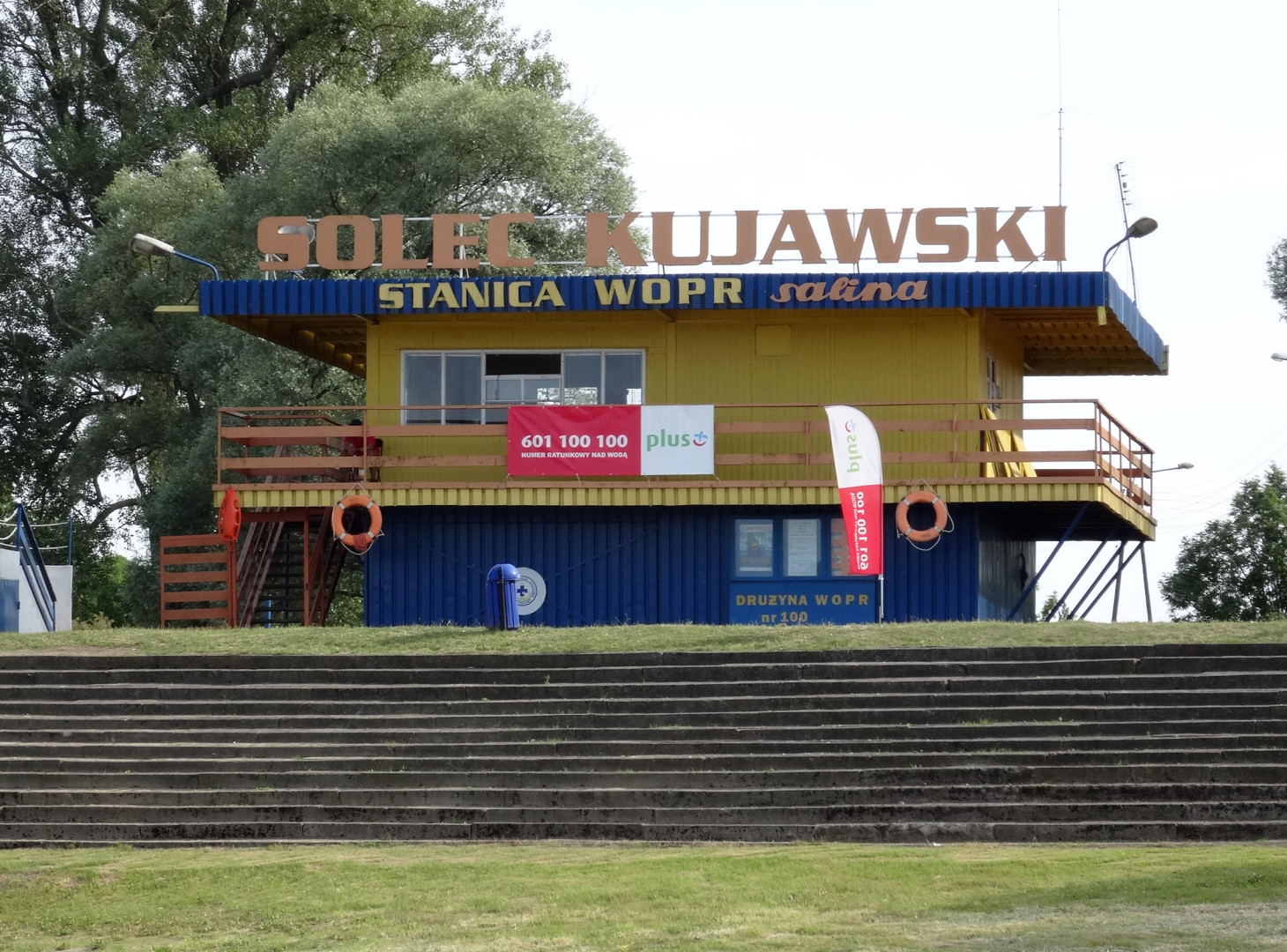 Stanica Wodnego Ochotniczego Pogotowia Ratunkowego nad Wisłą w Solcu Kujawskim